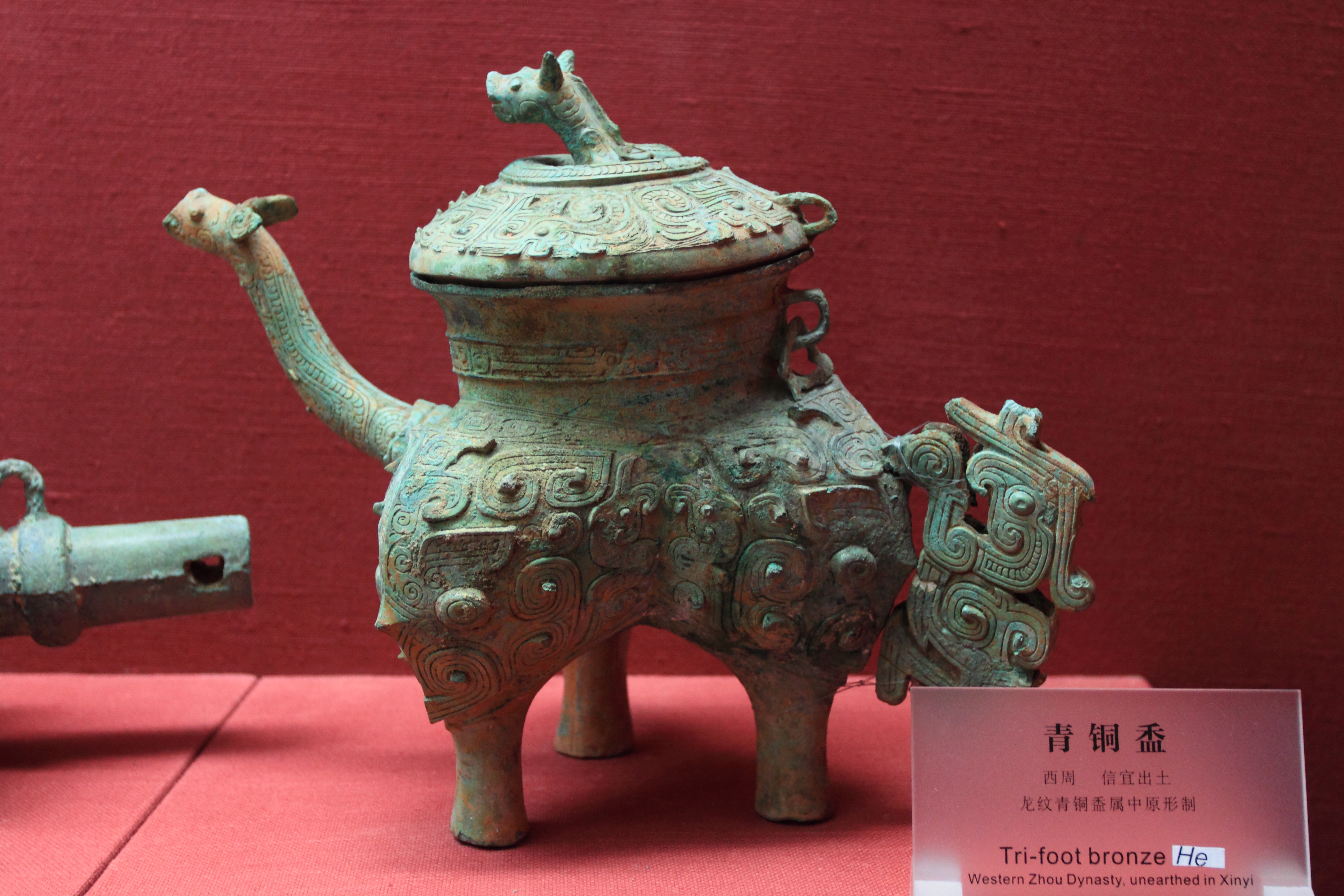 广东省博物馆 —— 广东历史文化陈列 —— 青铜盉，西周，信宜出土